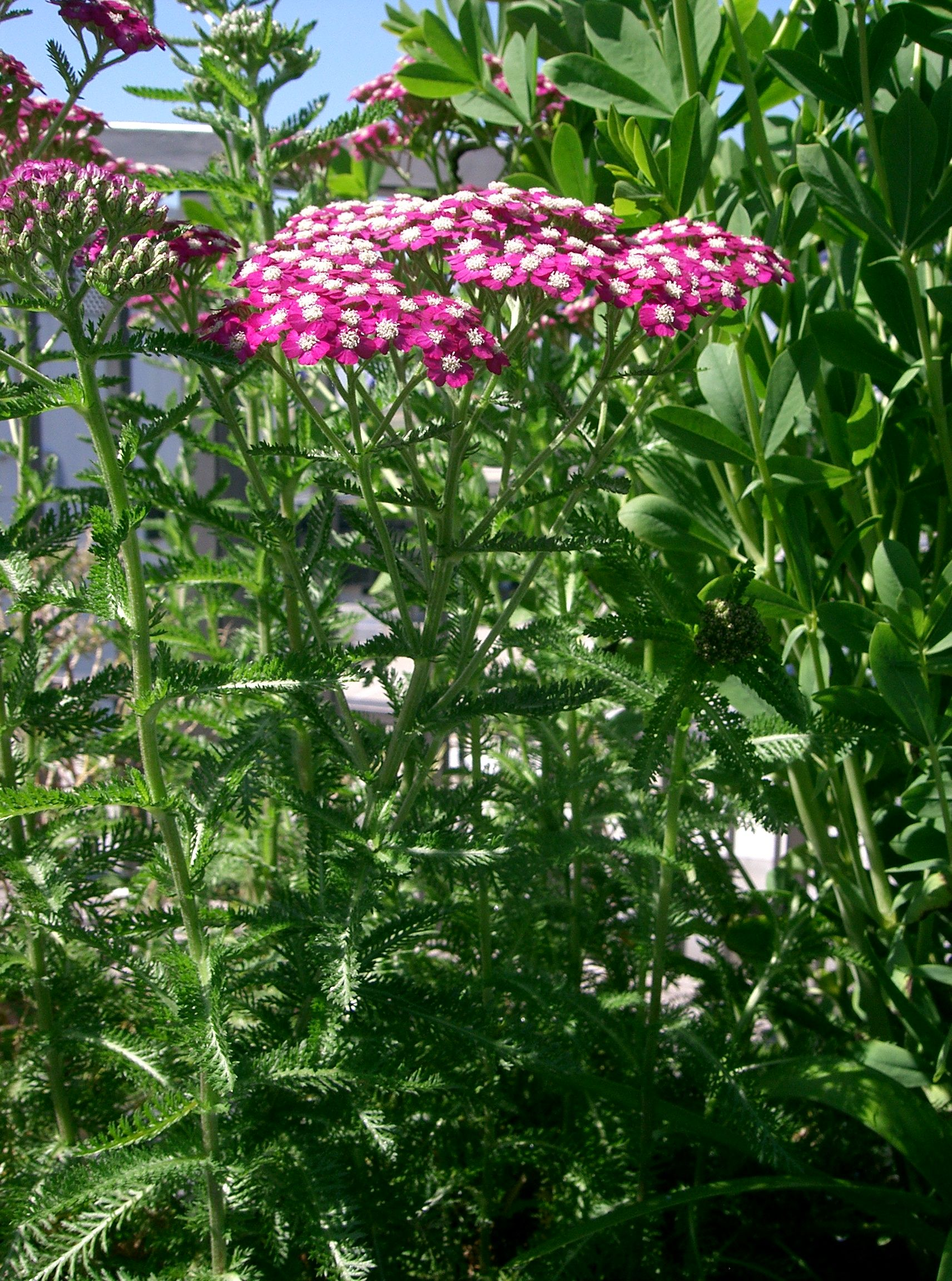 Achillea millefolium, magenta cultivar.